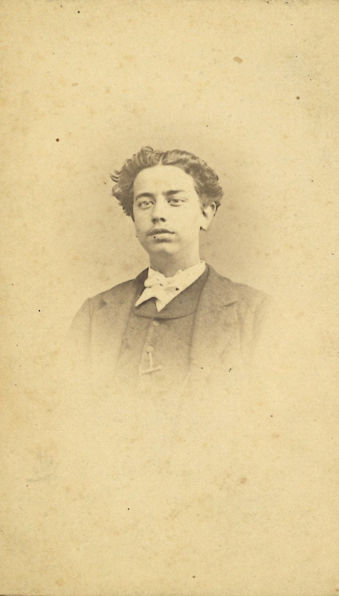 Manuel de Vereterra y Lombán (1852-1931), jefe del partido conservador en Asturias, diputado a Cortes, senador vitalicio, y Maestrante de Granada.